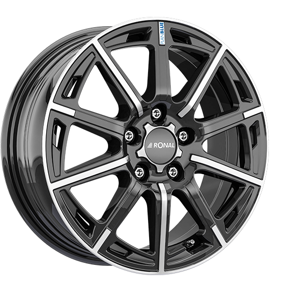 R-60 Blue Rad Jetblack Frontkopiert, Plan Blue Rad